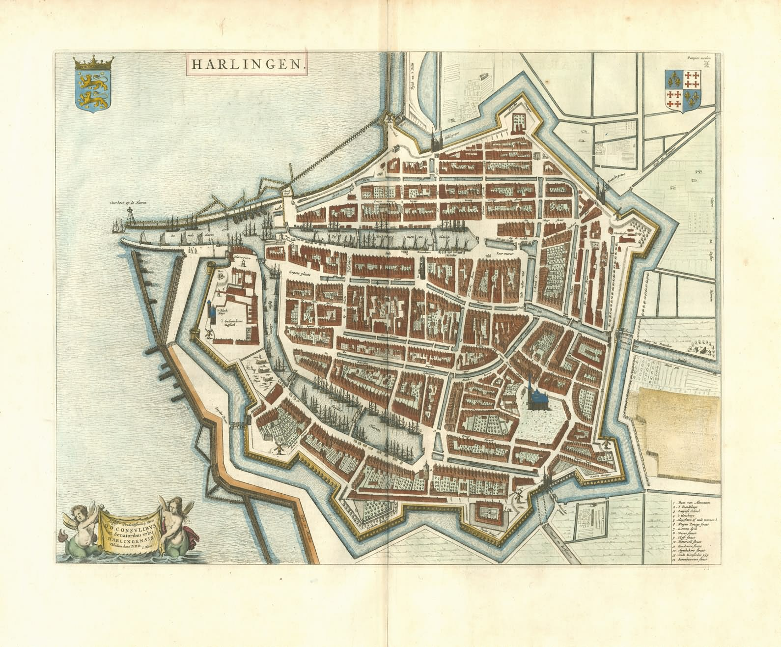 title: Harlingen; size 38 x 50